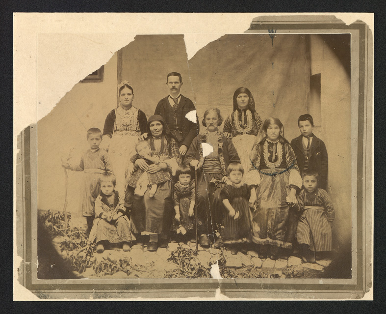 Апостол Матов, съпругата му Петра Чакърова и семейството им. Струга, 1904 година.